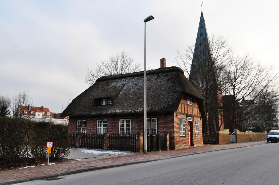 Cuxhaven 2014